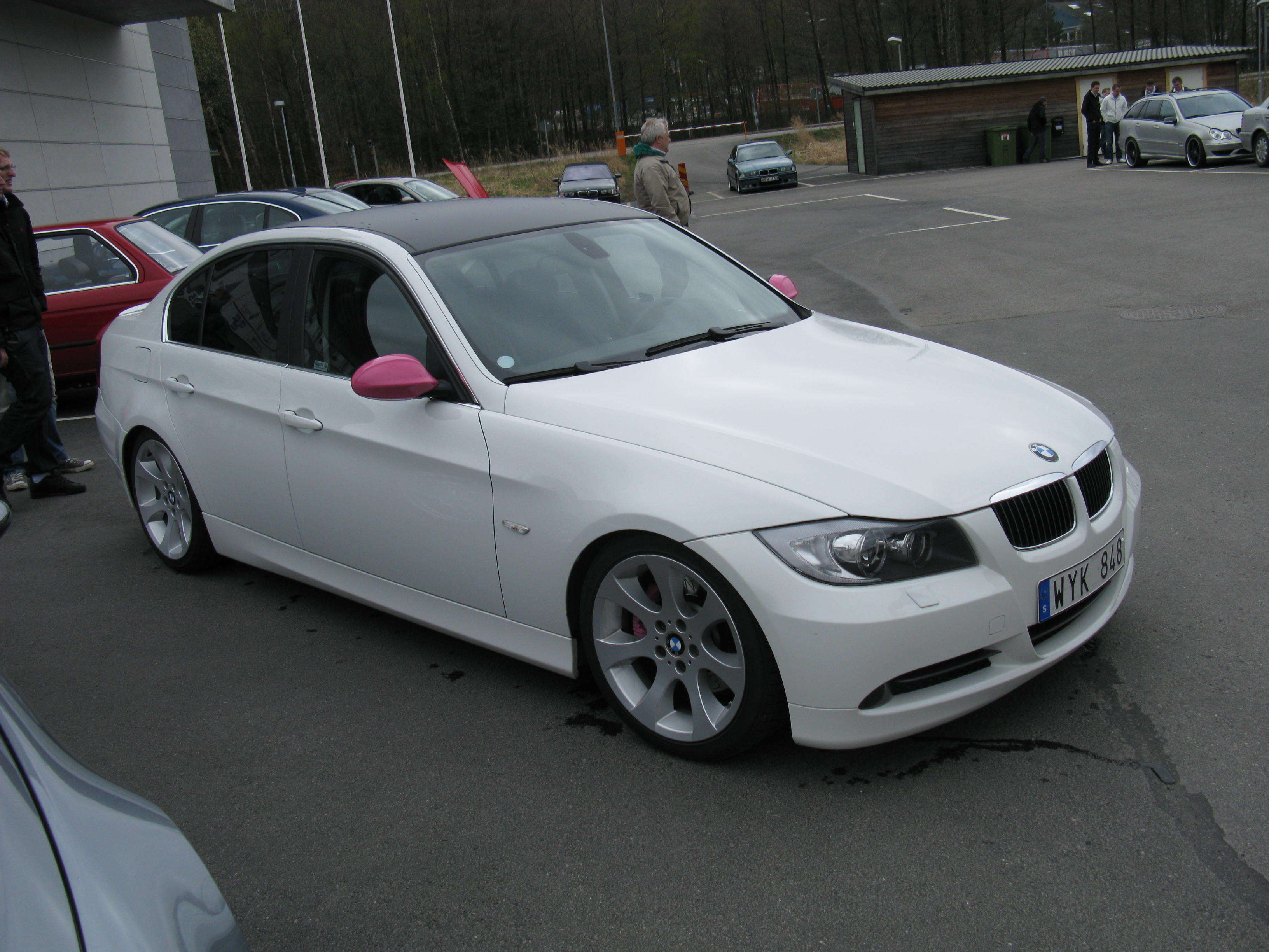 BMW 3-series